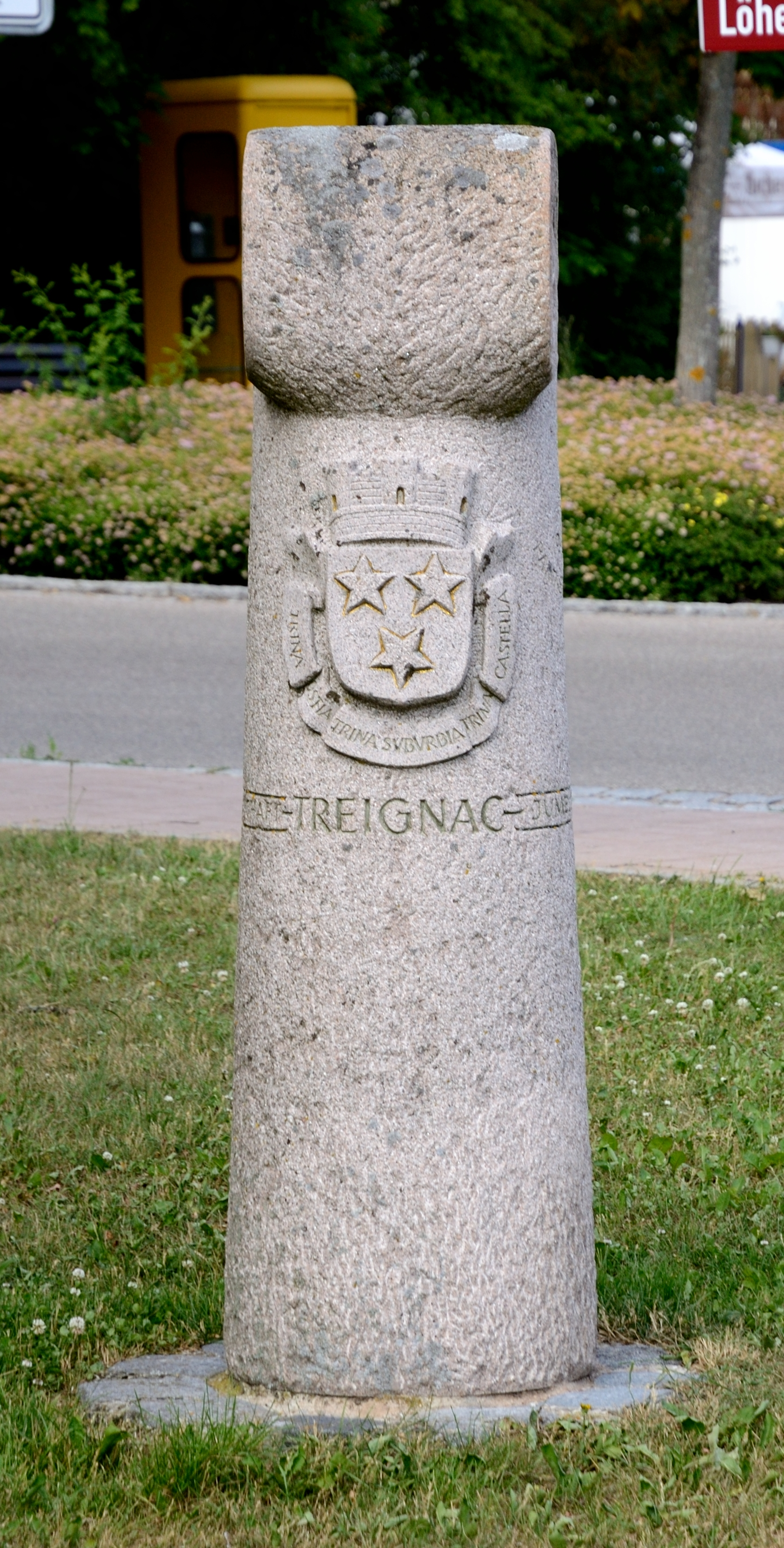 Gedenksäule (Partnerschaft Treignac-Neuendettelsau)